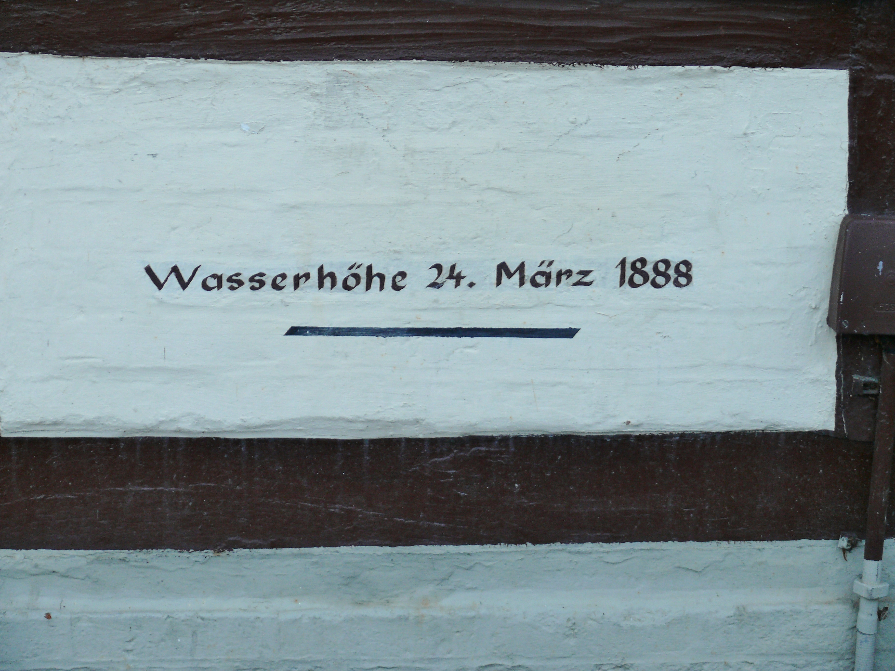 In einer kleinen Gasse zwischen dem Adolfsplatz und der Langen Straße in Dannenberg (Elbe), befindet sich diese Markierung über die Höhe des Hochwassers am 24.03.1888.